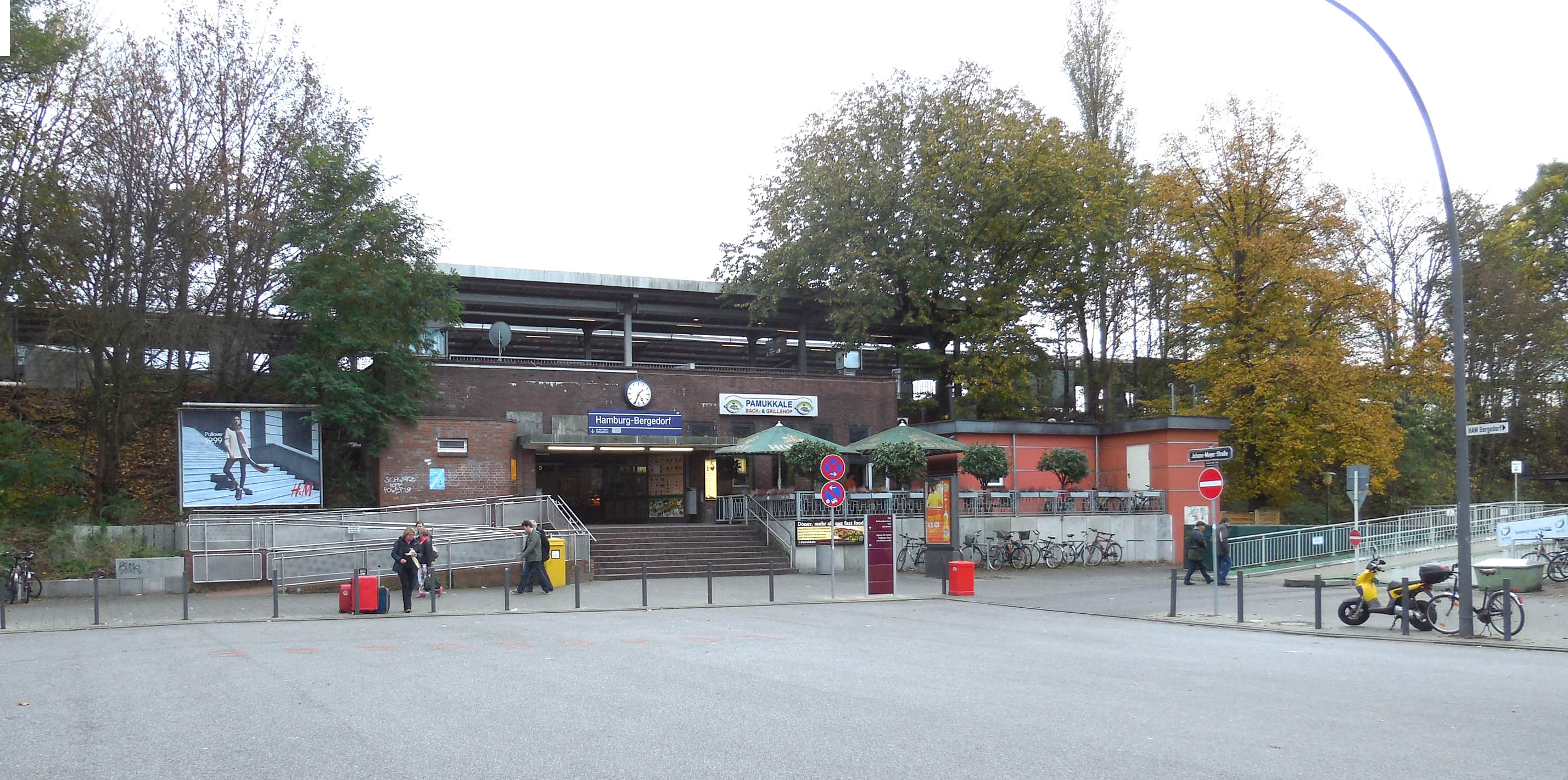 Bahnhof Bergedorf Zugang Nord von / nach Lohbruegge